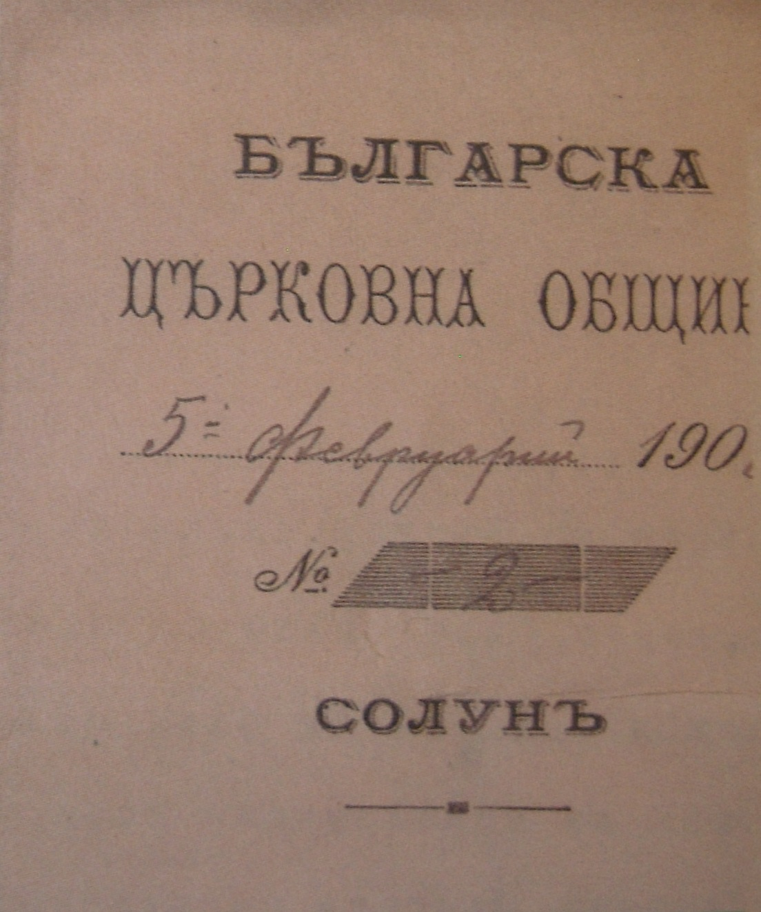 Глава на документ на Солунската българска община